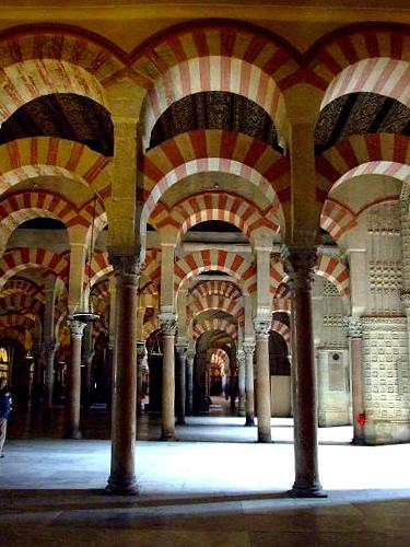 Interior de la Mezquita-Catedral de Córdoba